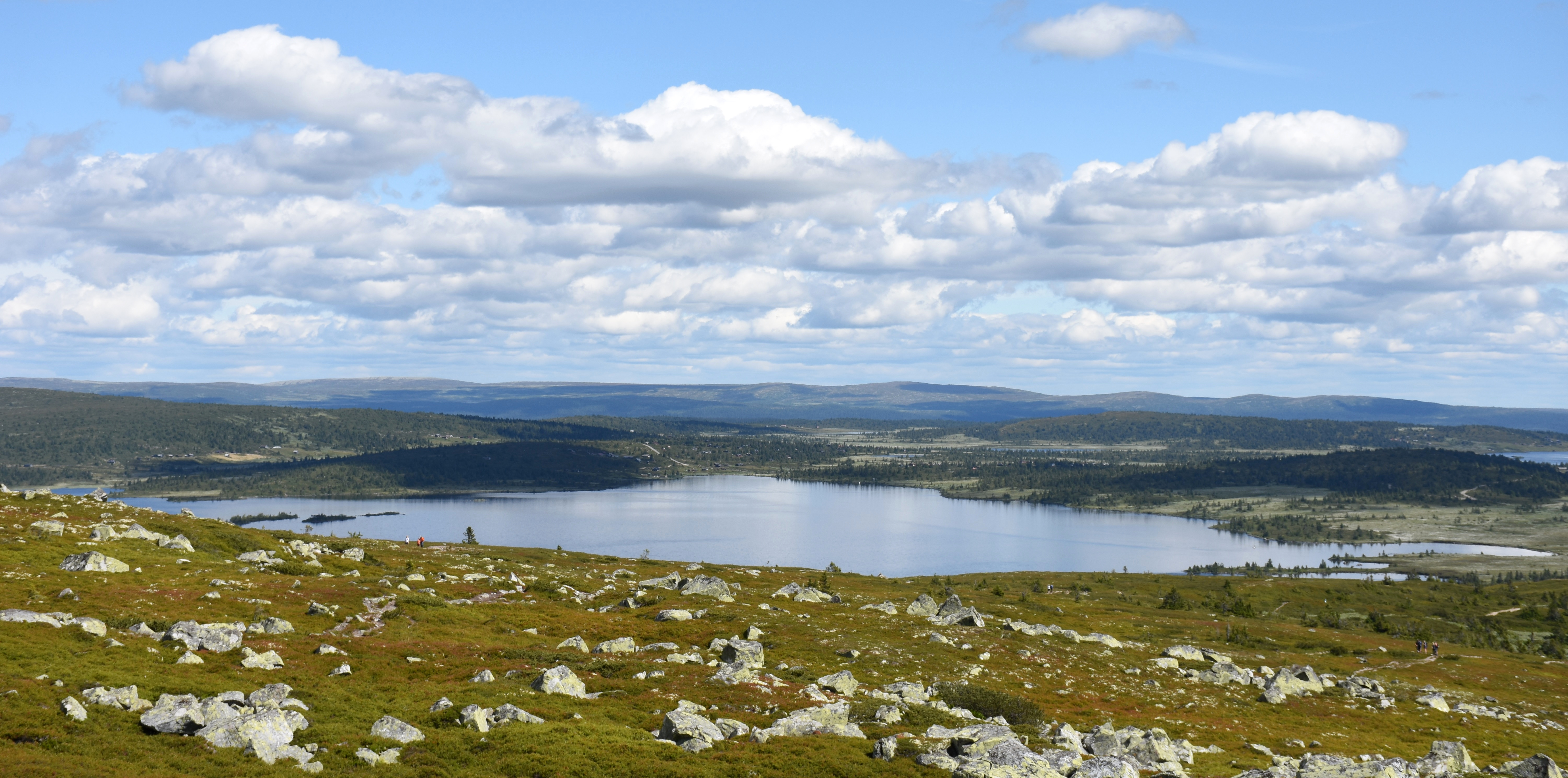 Reinsvatnet sett fra Nevelfjell